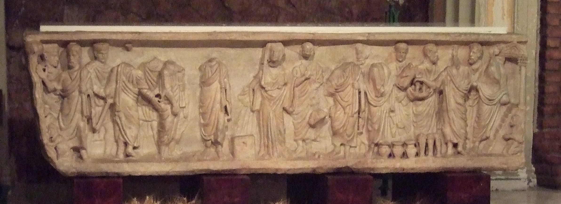 Sarcófago de la Trilogia petrina (hacia 340-350), arte paleocristiano. Representación de escenas de la vida de San Pedro. Se encuentra en la Basílica de Santa Engracia.